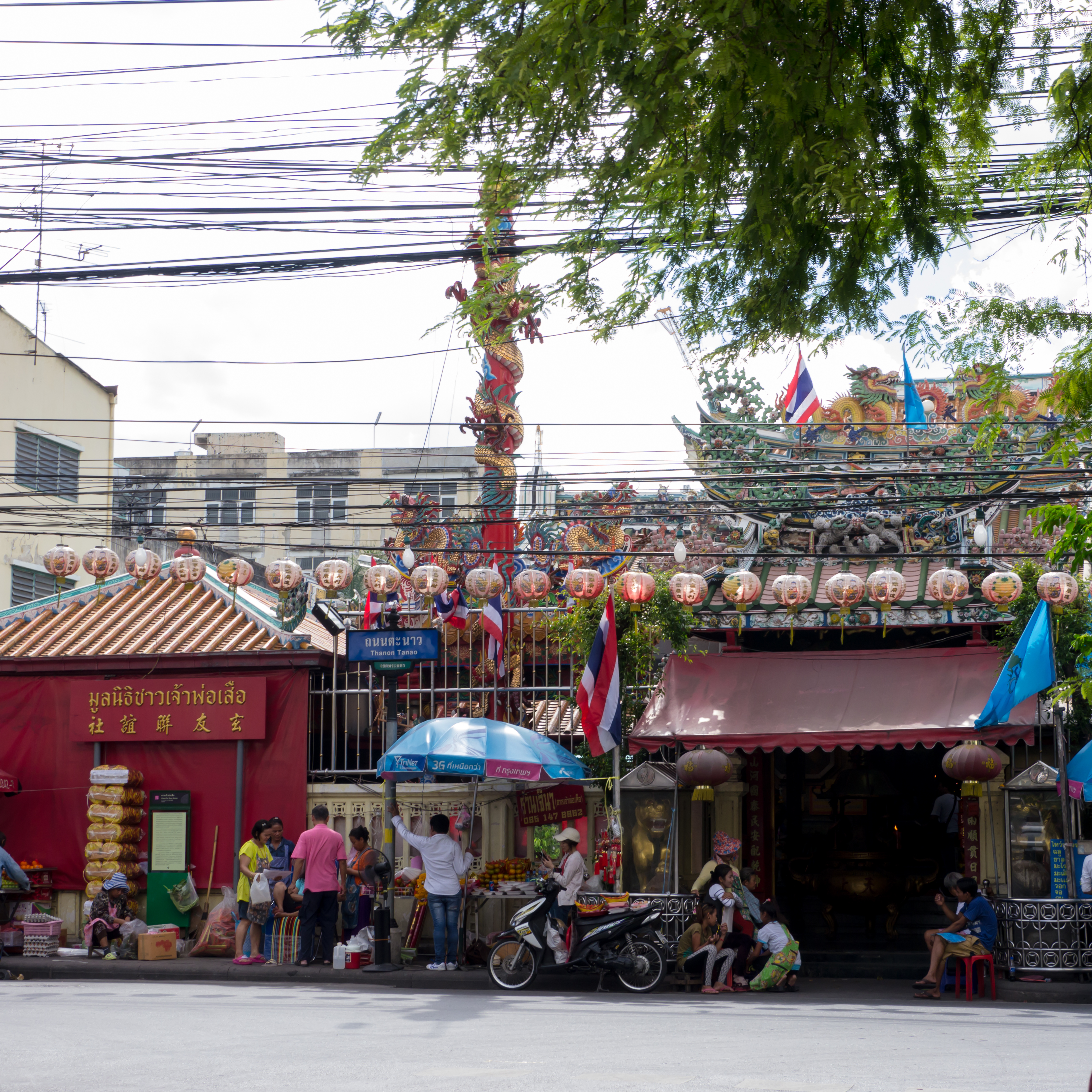 ศาลเจ้าพ่อเสือ